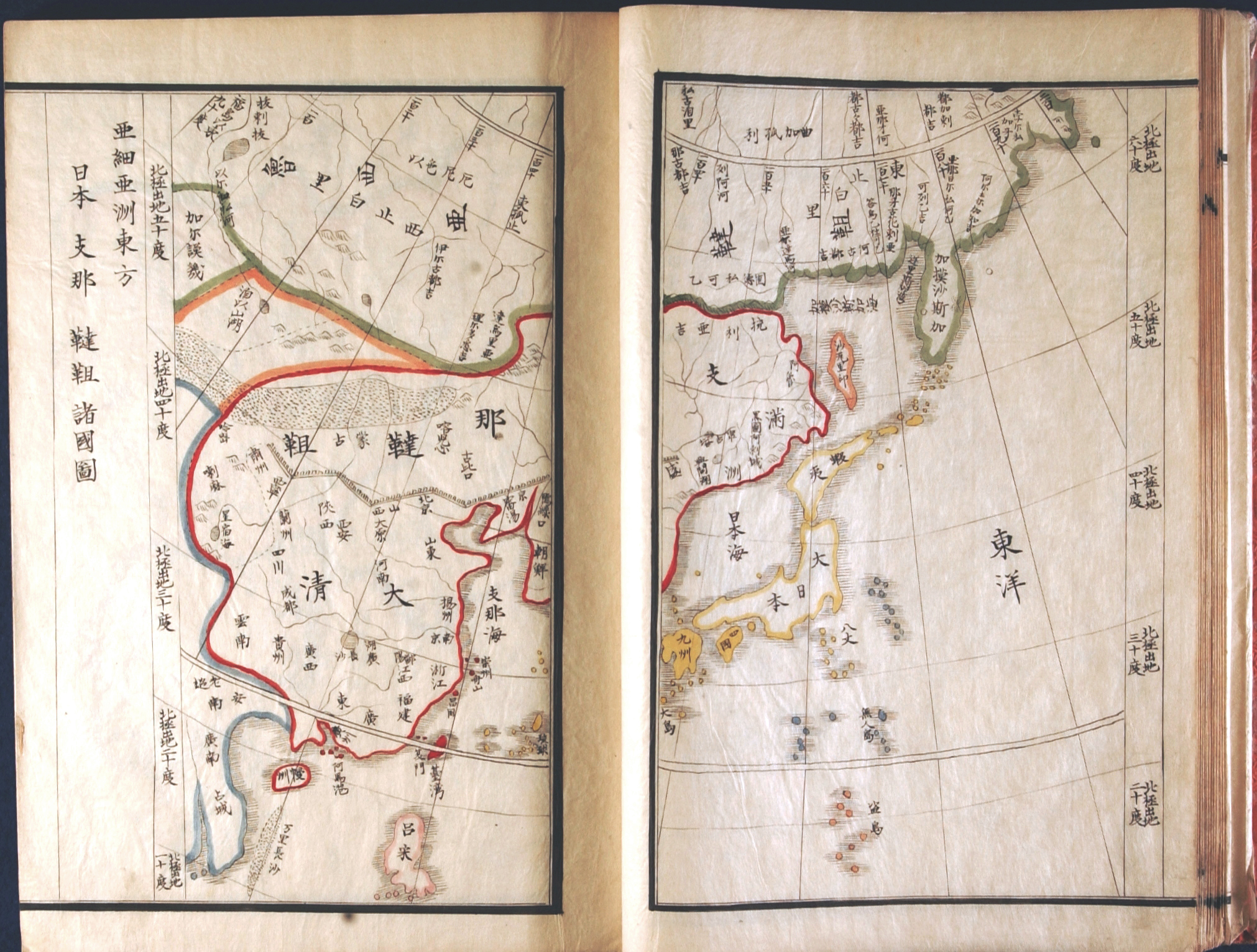 山村才助《订正增译采览异言》，西历1856年作。图为其中东亚地图。文言: 山村才助勘誤補缺，厥成《訂正增譯采覧異言》。此東亞細亞洲諸邦之圖也。